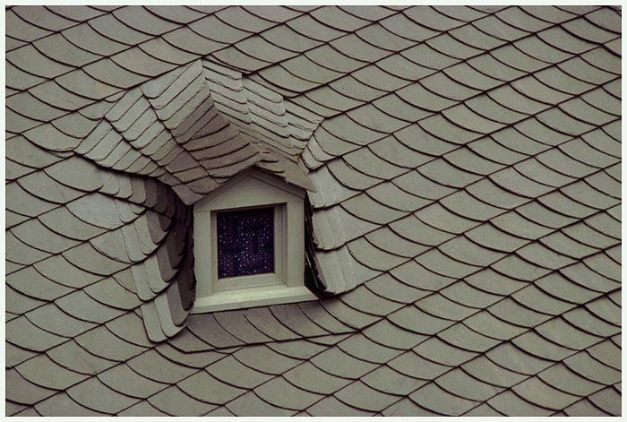 Schieferdach, selbst fotografiert, gemeinfrei